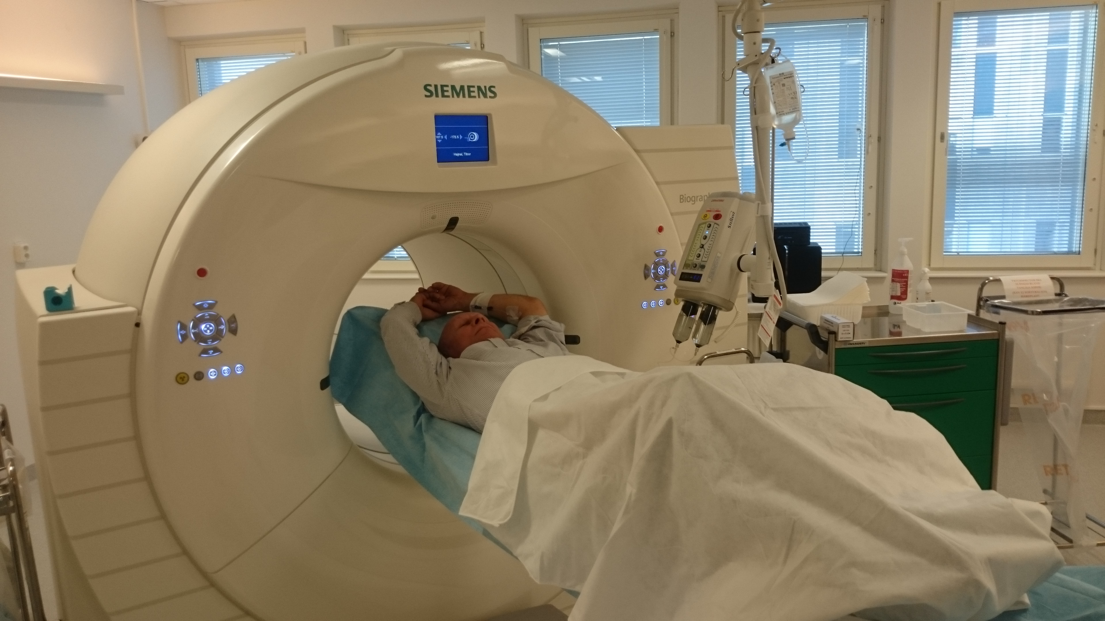 PET/CT-scanner på Karolinska universitetssjukhuset Huddinge